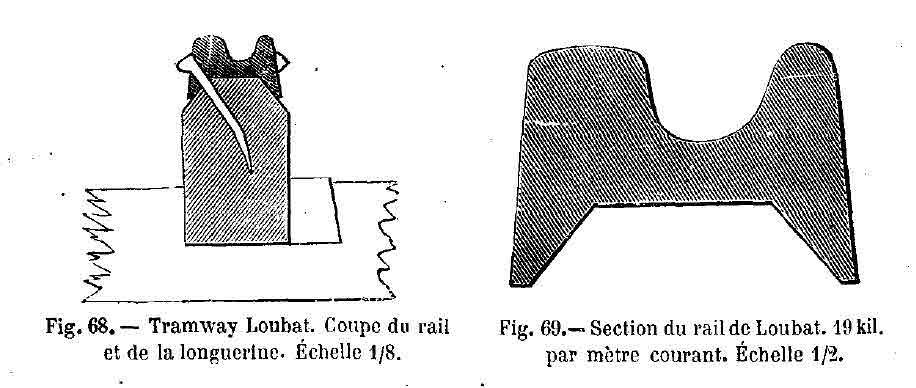 Profil en coupe du rail inventé par Alphonse Loubat pour ses "chemins de fer américains" (tramways hippomobiles)